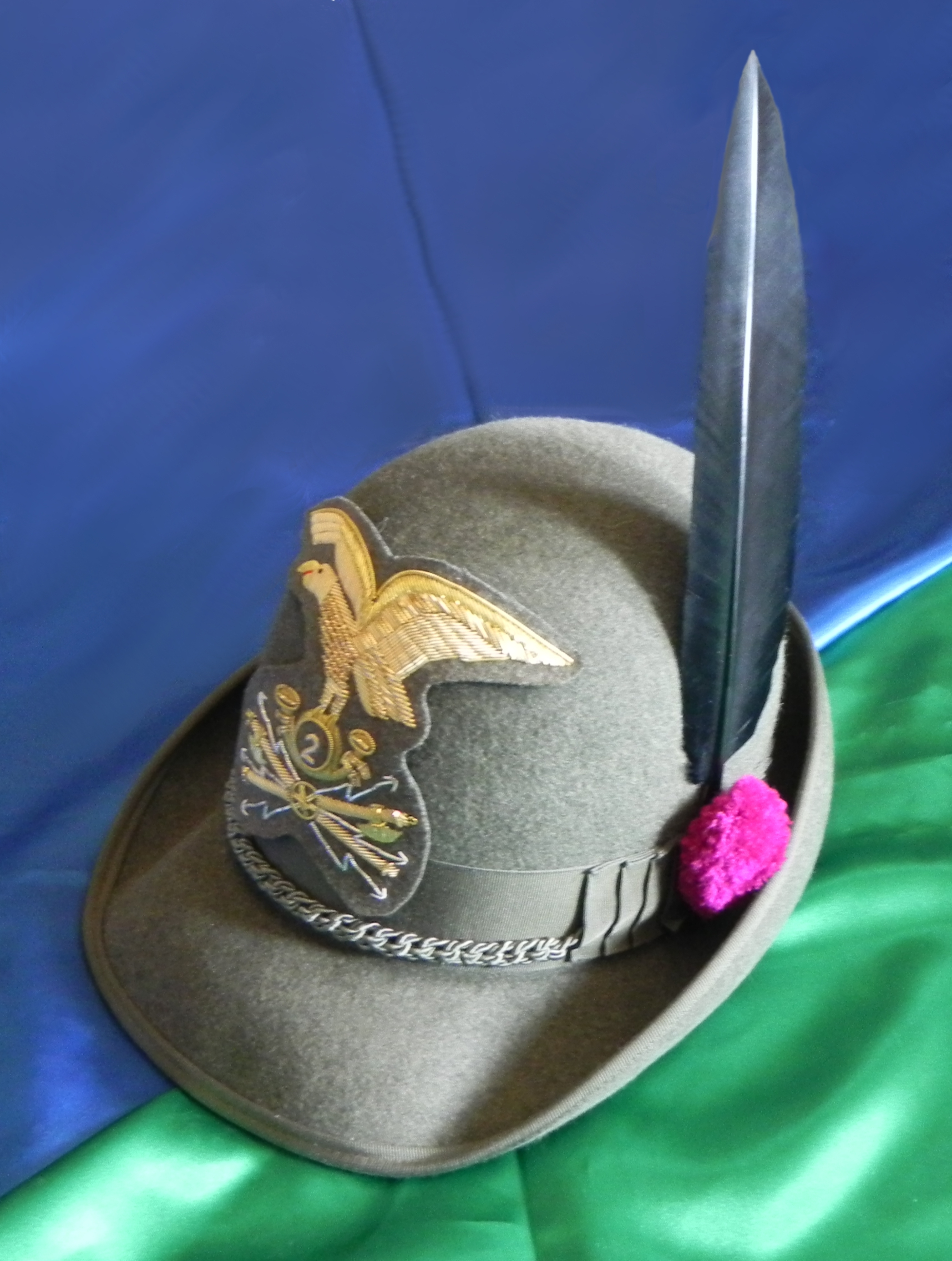 Cappello Alpino Graduati in Servizio Permanente